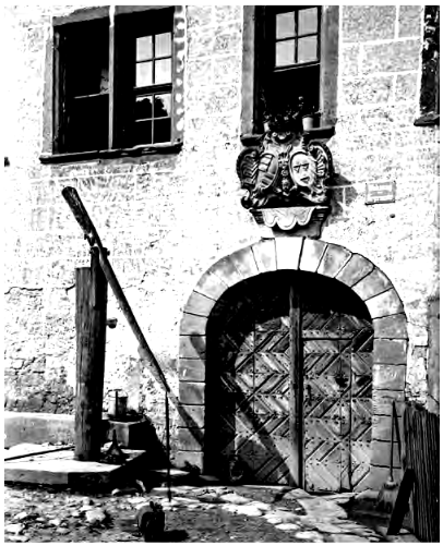 Leuzendorf, Schlossportal und Ziehbrunnen, Gelatinetrockenplatte 13x18